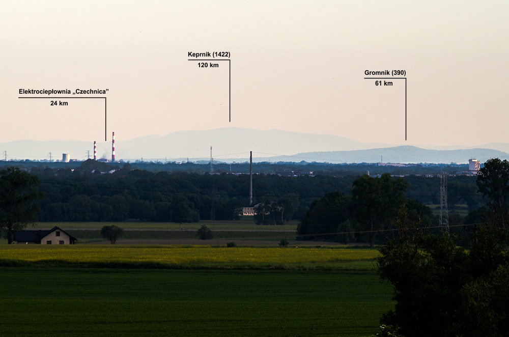 Daleka obserwacja Jesioników i Wzgórz Strzelińskich ze Wzgórz Trzebnickich